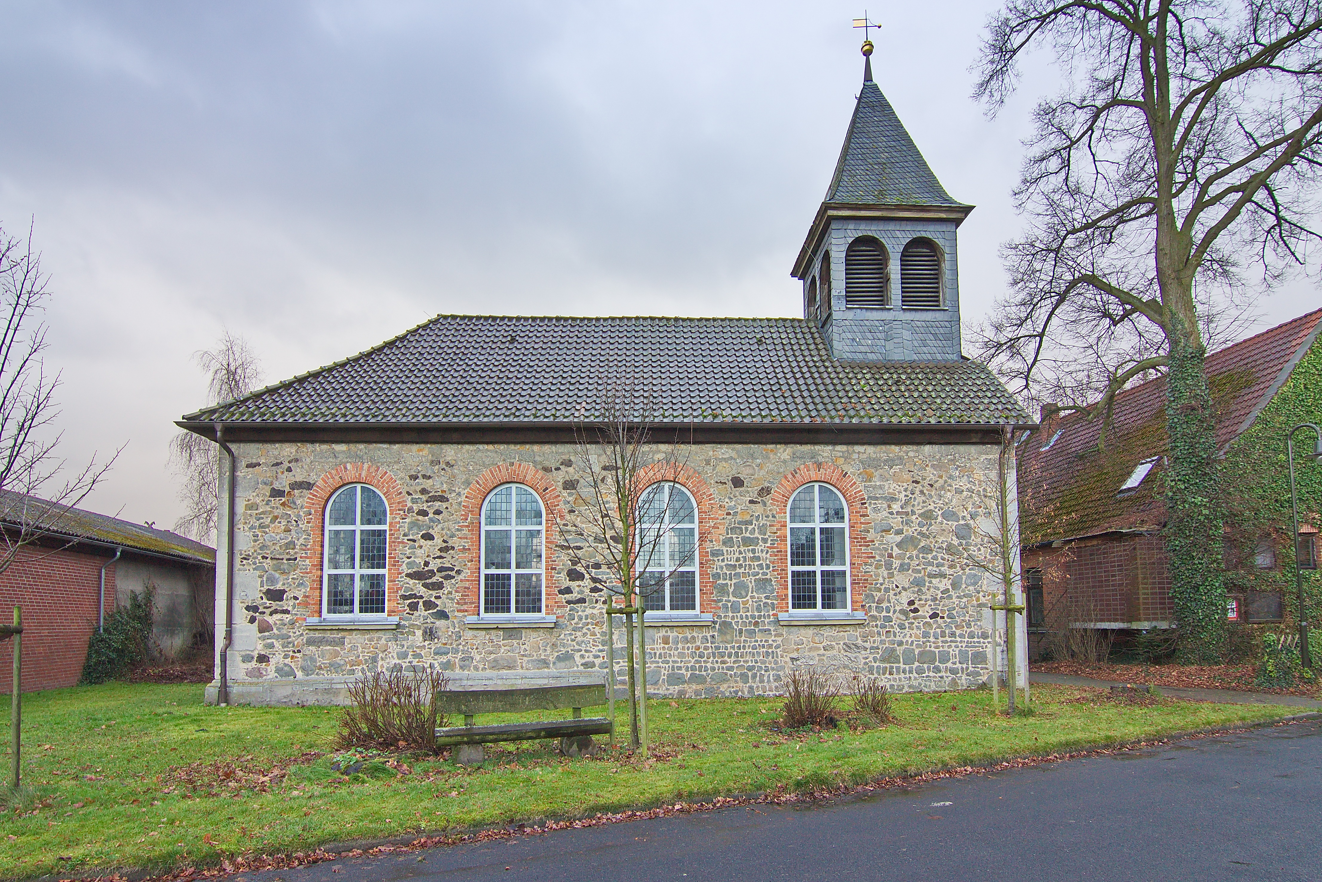 Die Nikolaikirche in Eickenrode (Edemissen) aus der zweiten Hälfte des 17. Jahrhunderts wurde aus einfachen Bruchsteinen errichtet und enthält als ältestes Inventar eine Glocke aus dem Jahr 1507 des Glockengießermeisters Harmen Koster.